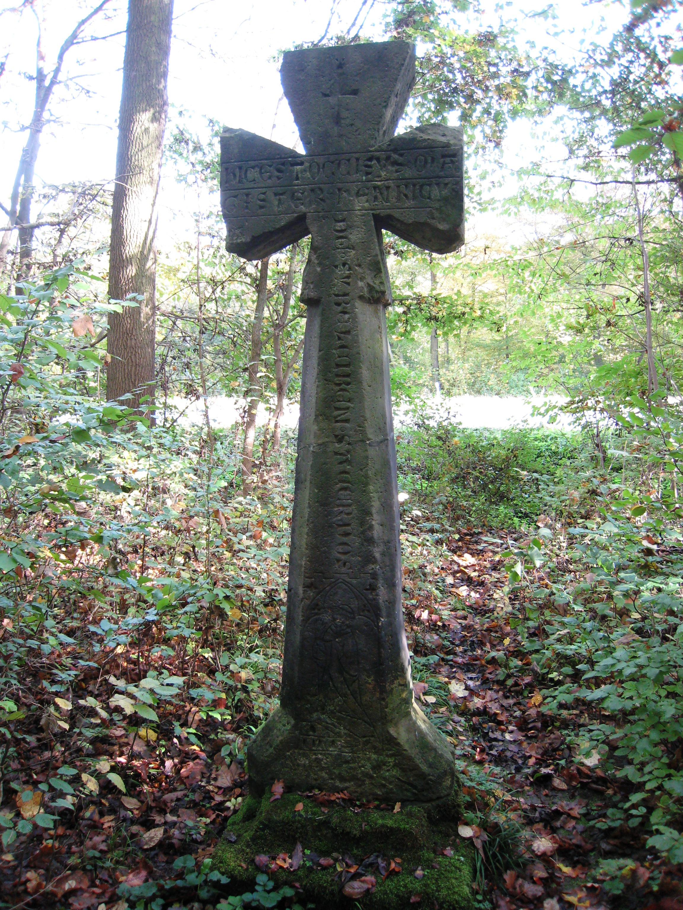 Sühnekreuz oder Mönchskreuz in der Nähe des Gasthofes Hubertus im Steigerwald, Erfurt